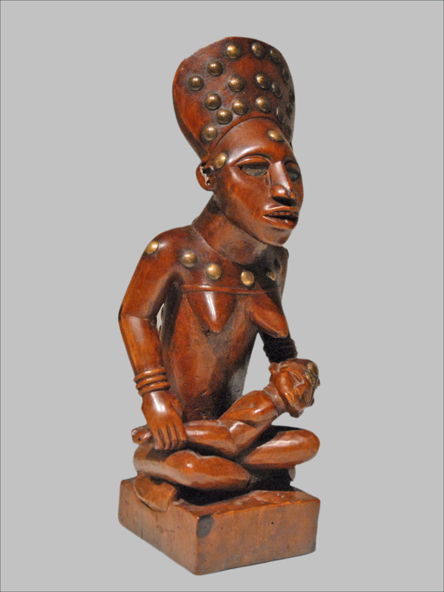 Maternité Phemba Kongo République démocratique du Congo bois, pigments polychromes, métal collection particulière, France Exposition Fleuve Congo Musée du quai Branly